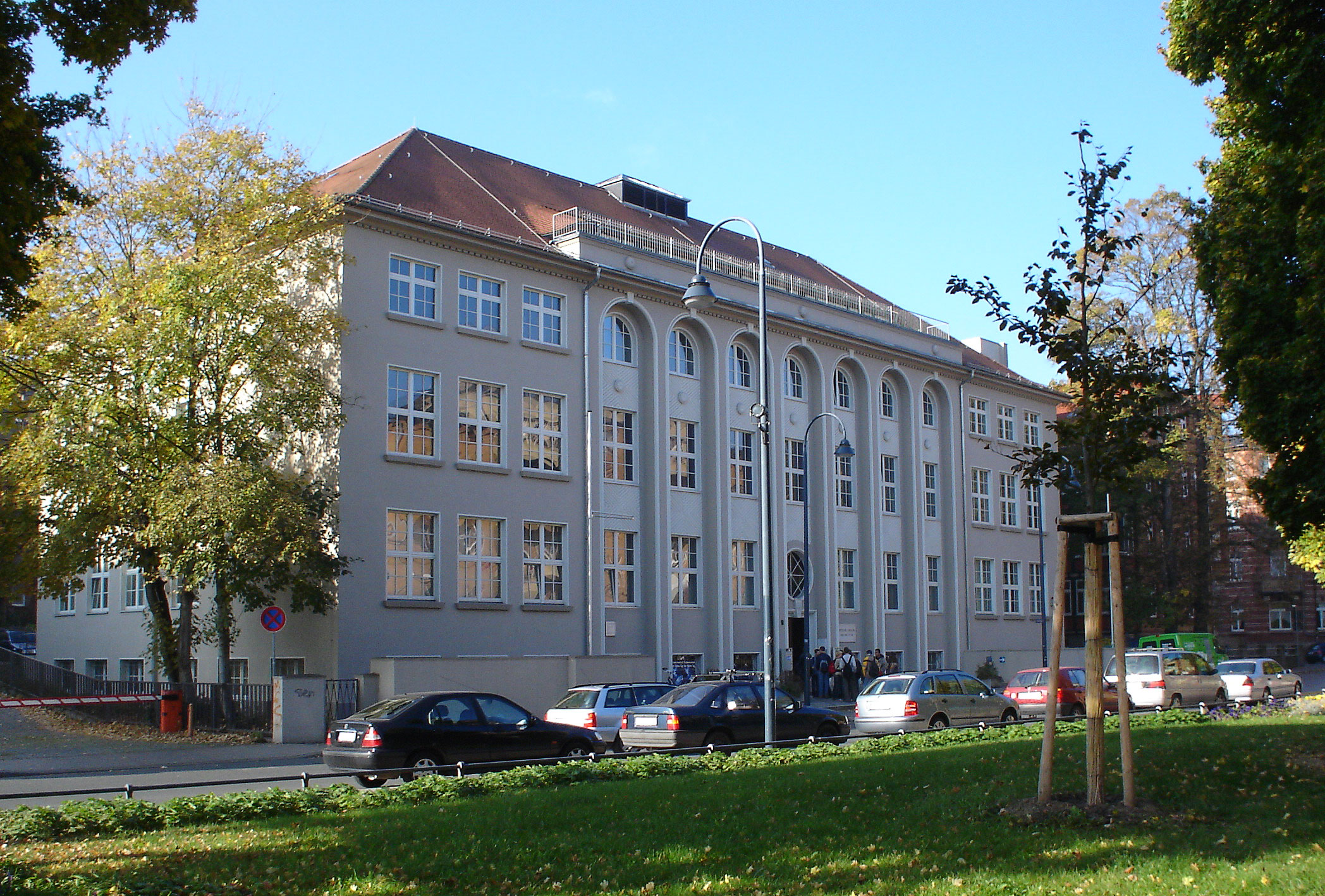 Frontansicht des Optischen Museums Jena. Fotografiert am 18.10.2005.